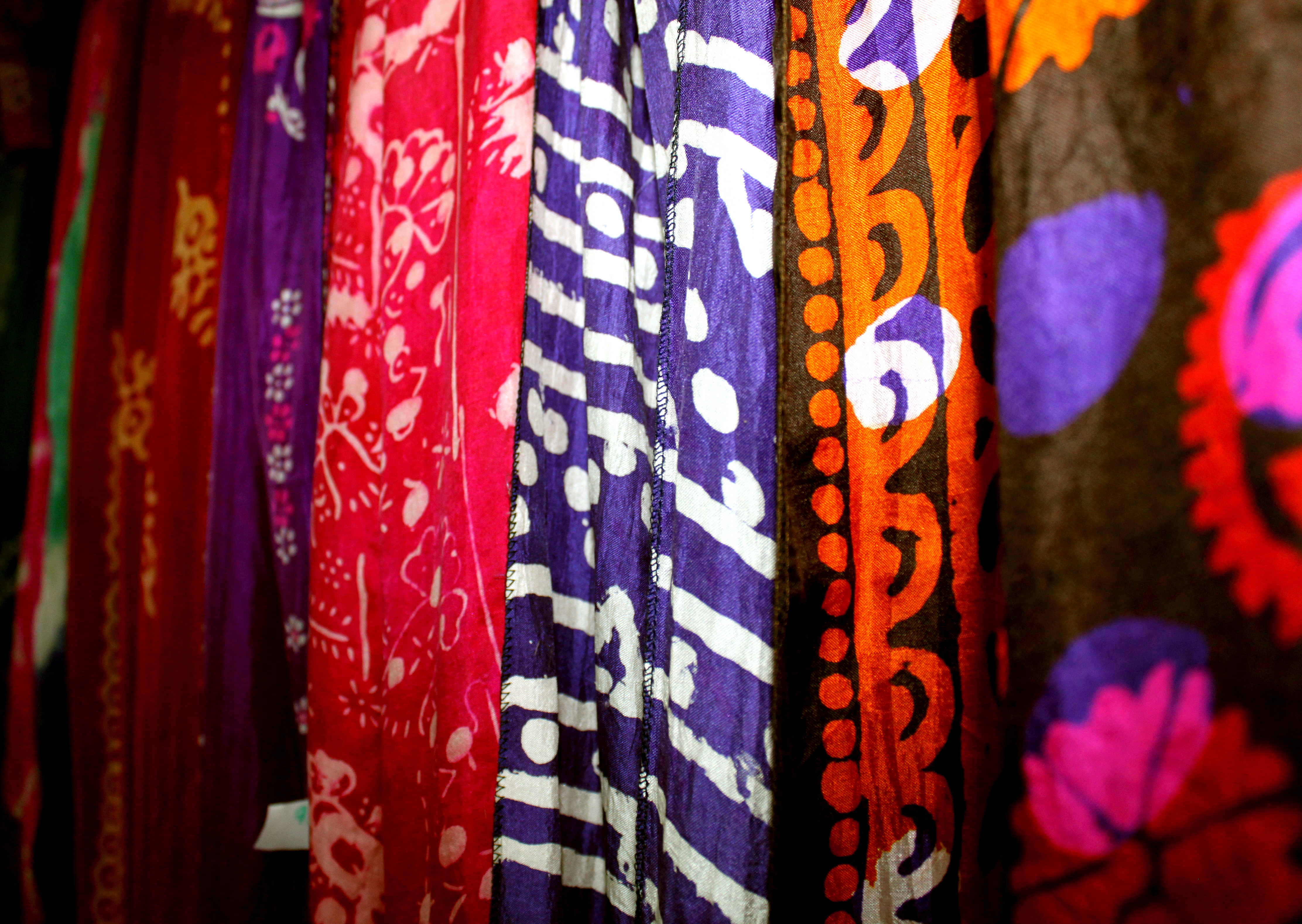 Azərbaycan kəlağayısının hazırlanması